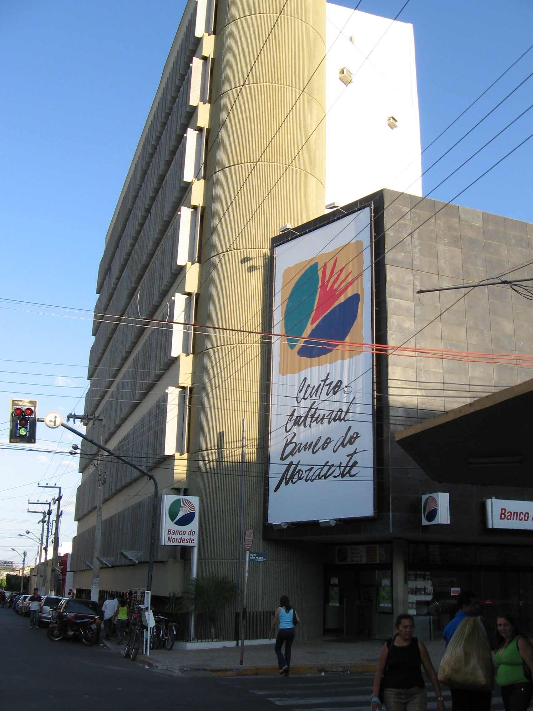 Centro Cultural do Banco do Nordeste. Em pleno centro de Juazeiro do Norte, dispõe de teatro, espaço para exposições e uma biblioteca climatizada com infra-estrutura fantástica, acervo novo e vídeoteca com dvds. Fantástico!